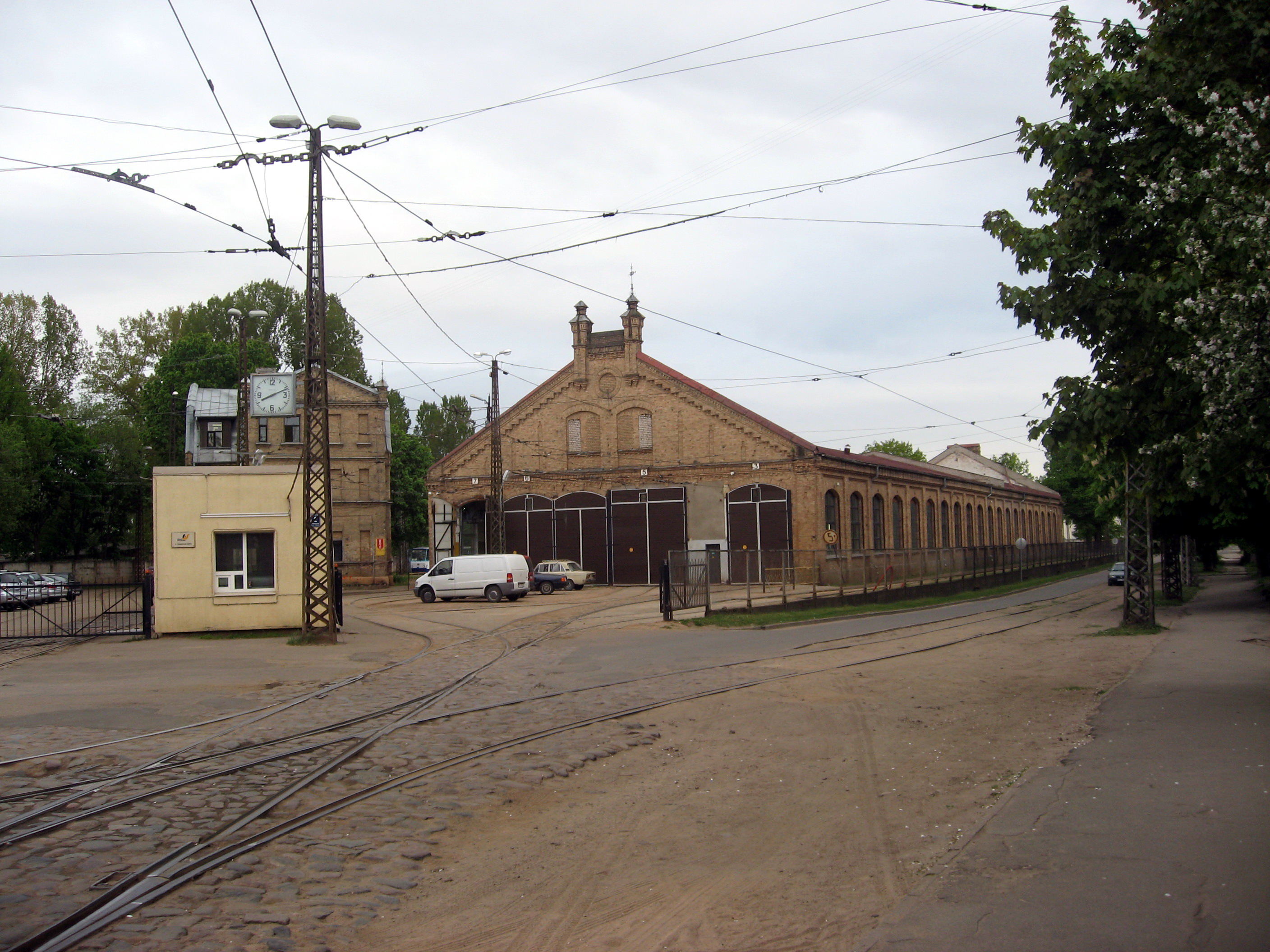 Riga, vozovna